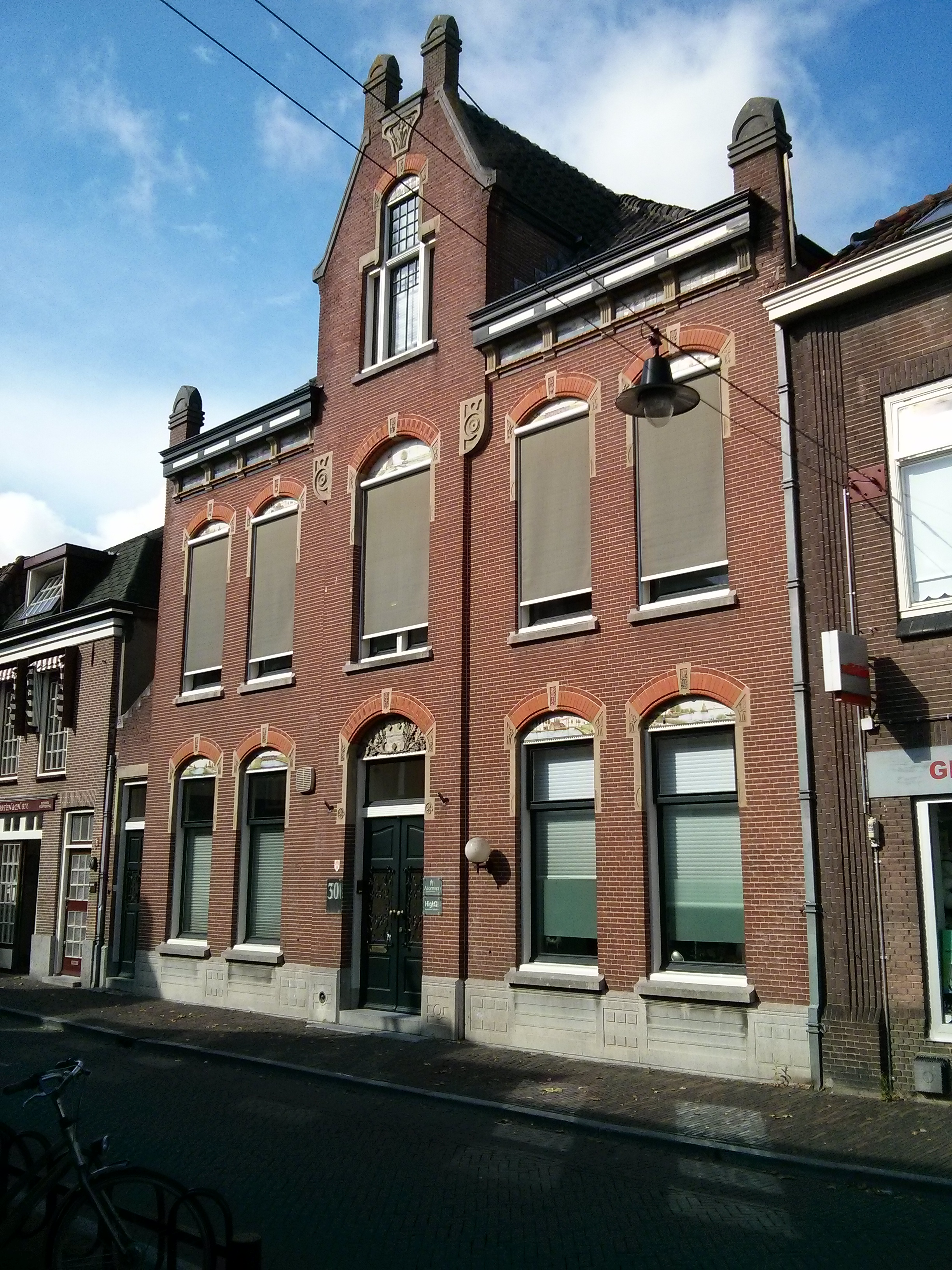 Kantoor Het Gemeendelandshuis van hetGrootWaterschap van Woerden